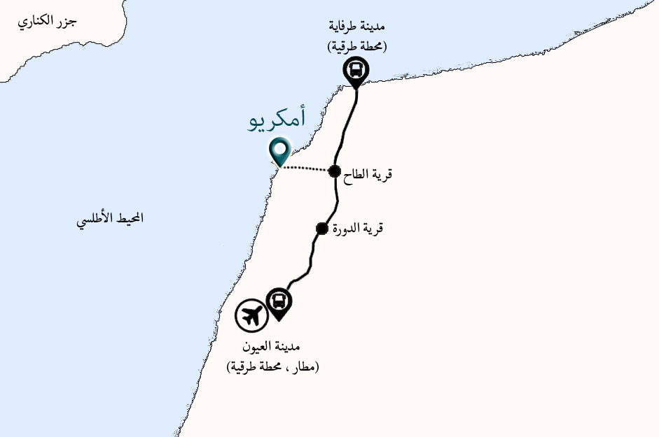 رسم توضحي لأقرب المحطات الطرقية و المطارات لقرية أمكريو جنوب المغرب